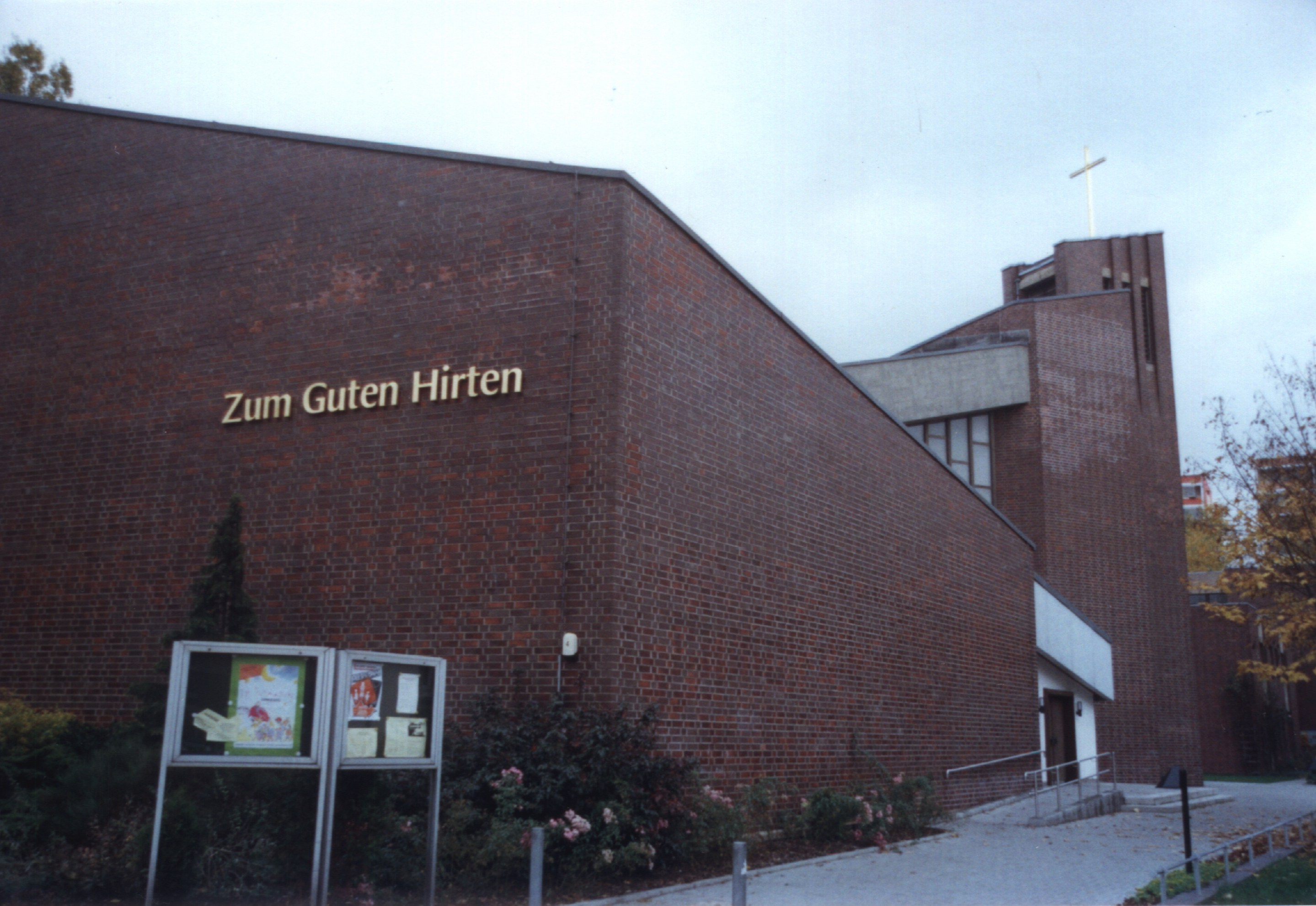 Die Kirche zum Guten Hirten im Stadtteil Berlin-Friedrichsfelde